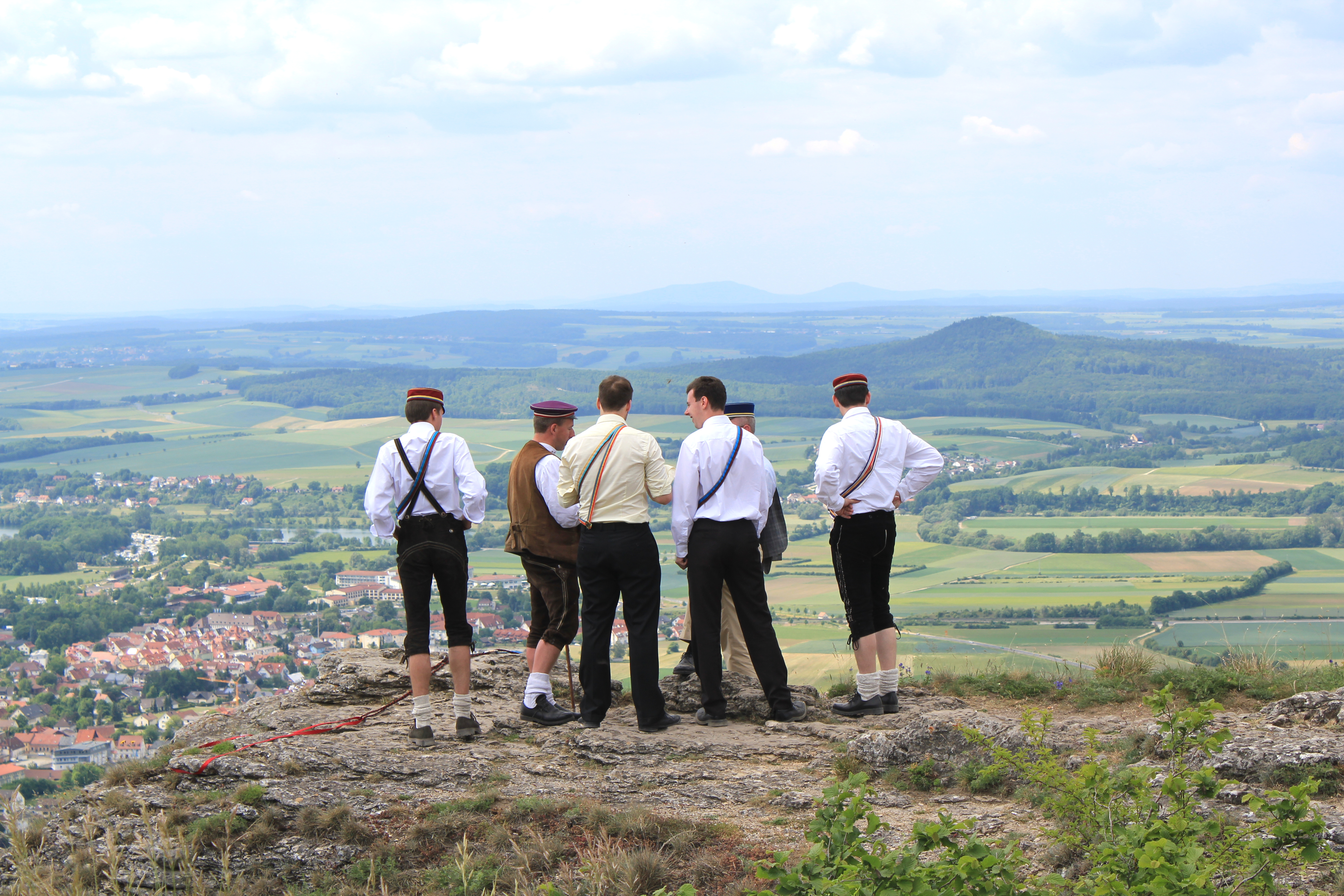 Mitglieder von Landsmannschaften und/oder Turnerschaften des Coburger Convents (u.a. Alte Prager Landsmannschaft Hercynia zu Frankfurt) bei einem Ausflug auf dem Staffelberg im Rahmen des Coburger Pfingstkongress 2012